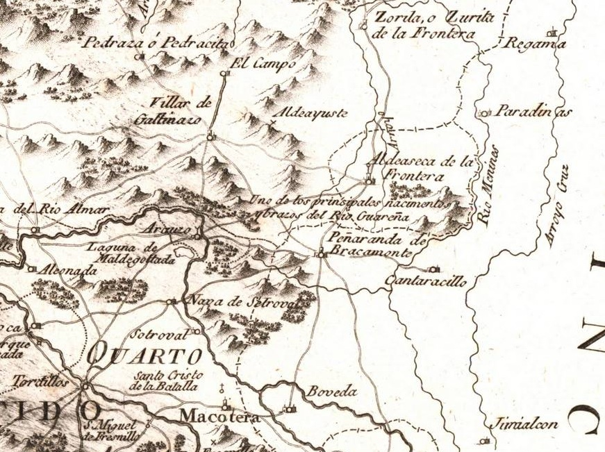 Detalle centrado en Peñaranda de Bracamonte del Mapa geográfico de la provincia de Salamanca (hoja nº 2), en el que se distinguen sus Partidos, Quartos, Sexmos, Rodas, Campos, Concejos y las Villas Sueltas (1787), por Tomás López..